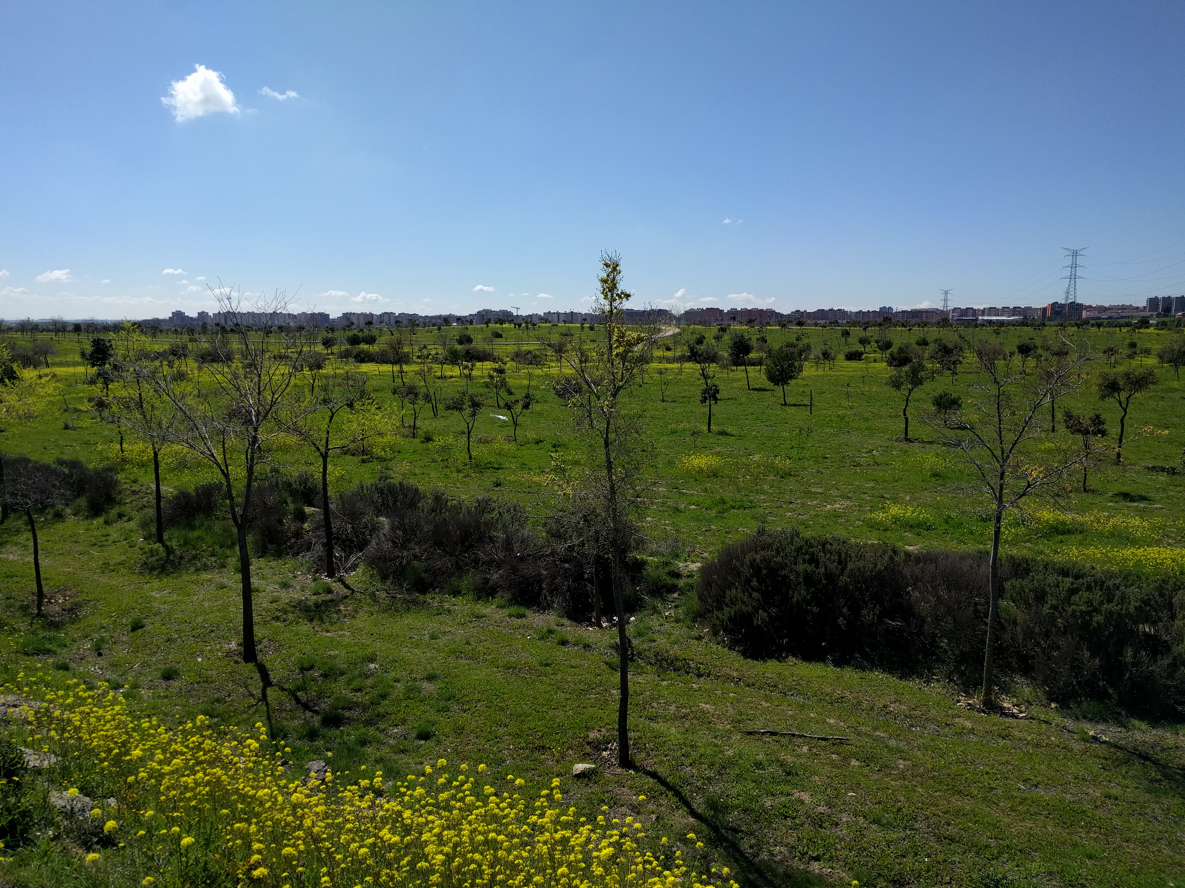 Vista de Bosque Sur (Fuenlabrada, Madrid, España)